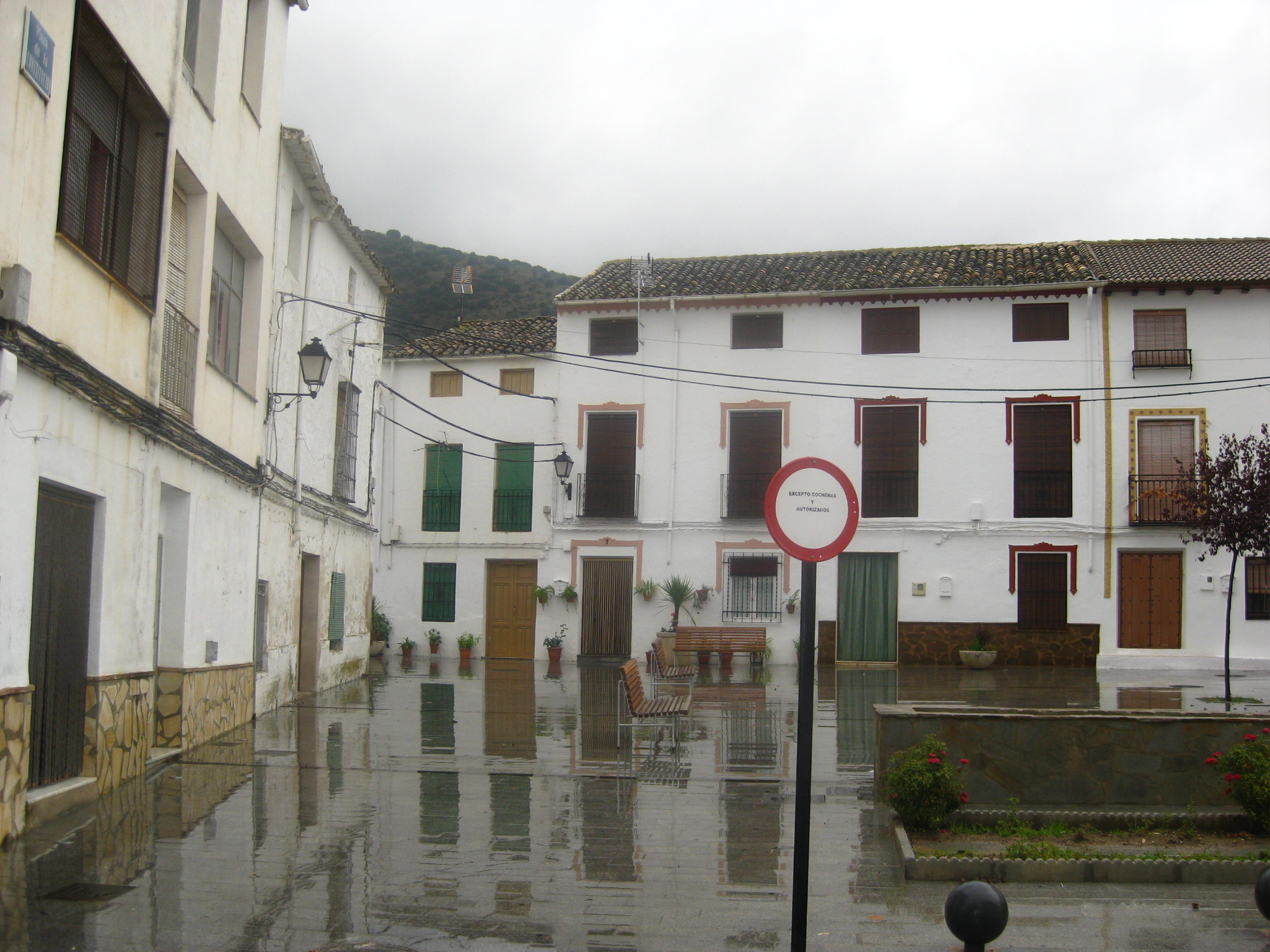 Plaza de España. Octubre de 2012